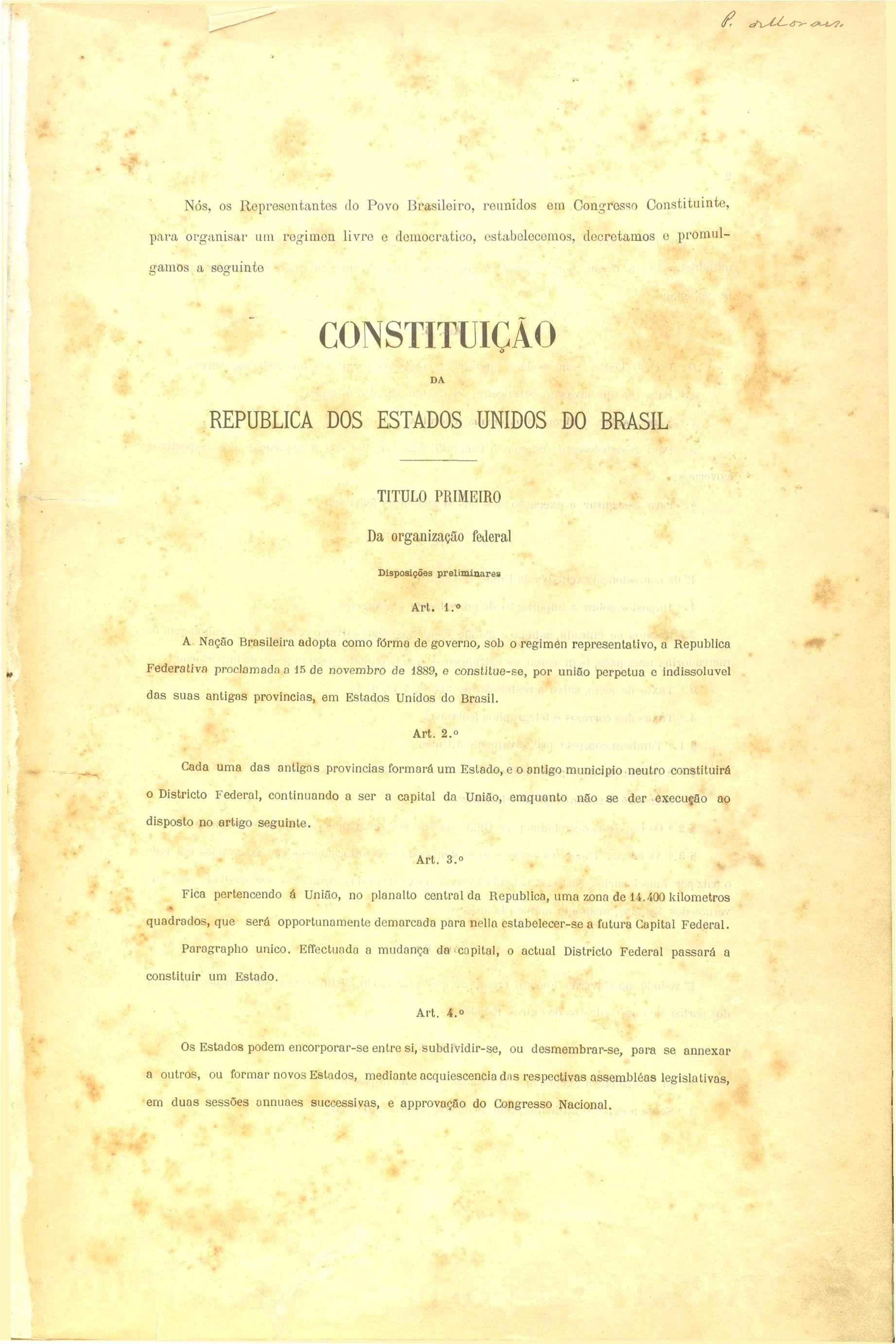 Página 01 da Constituição da República do Brasil, de 1891.